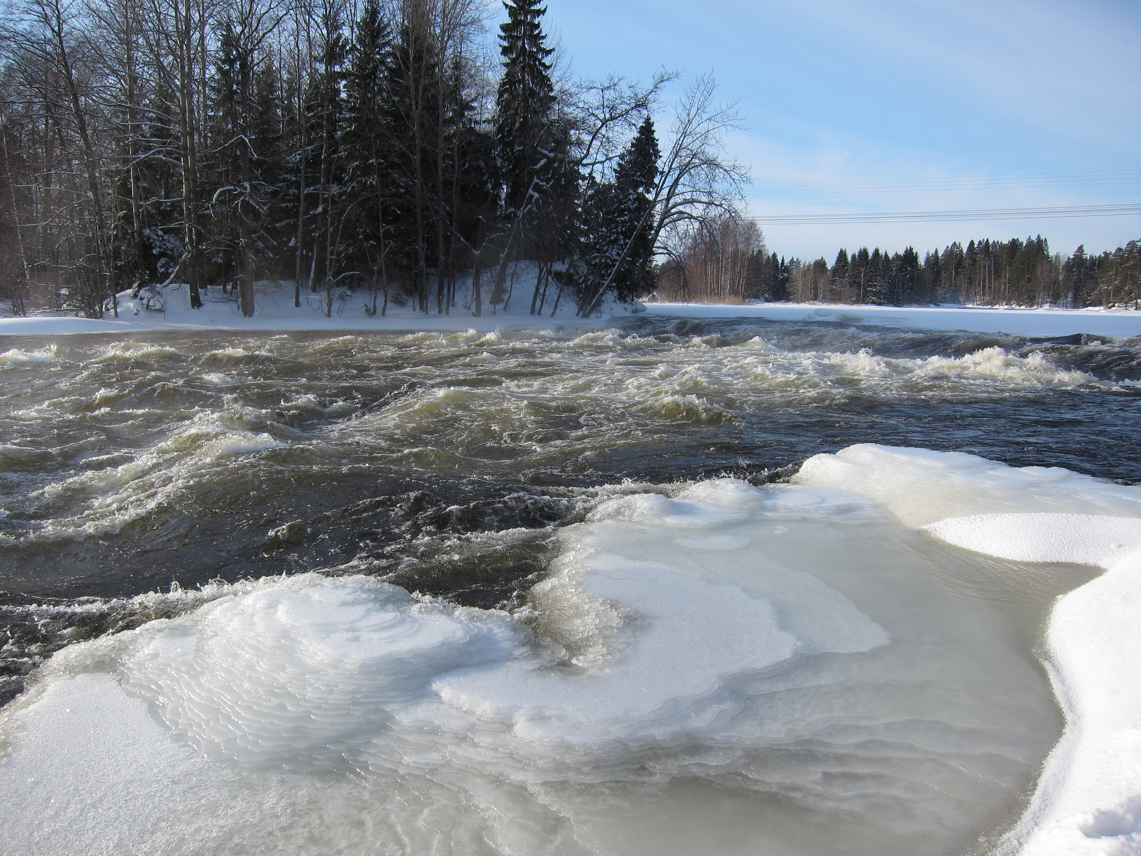 Kymijoen Pernoonkoskien Sittaränniä Kotkassa.